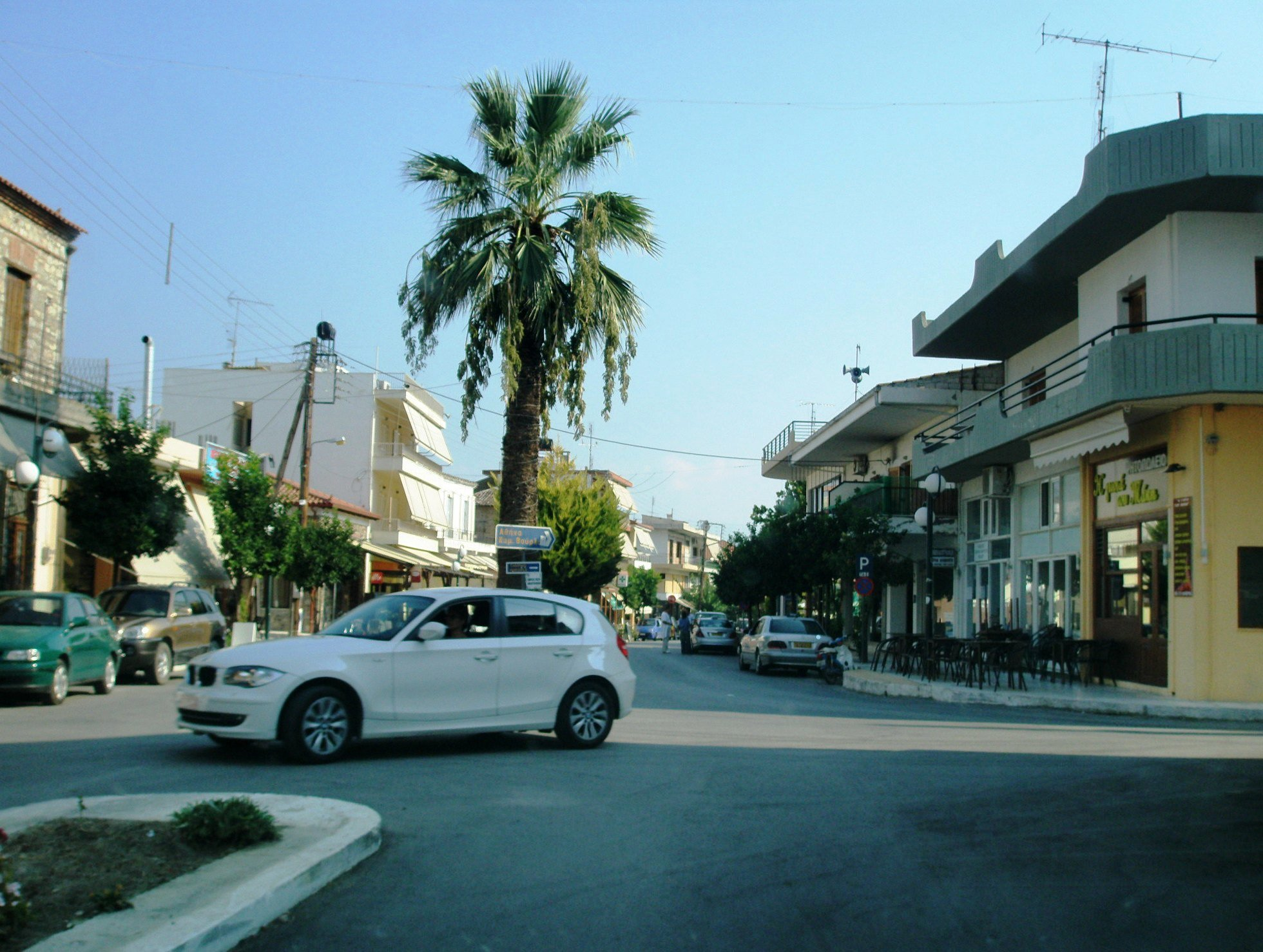 Διασταύρωση οδών Λεωνίδου και Οδυσσέα Ανδρούτσου